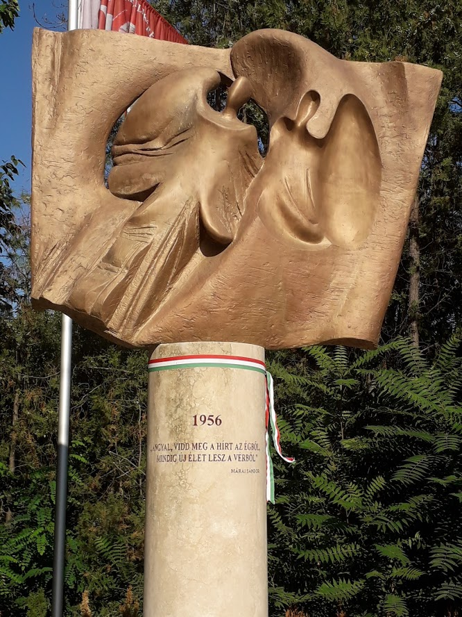 Az abai önkormányzat az 1956-os emlékművet 2006 tavaszán, az 1956-os forradalom és szabadságharc 50. évfordulója alkalmából állítandó köztéri képzőművészeti alkotások támogatására kiírt pályázat egyik nyerteseként állíthatta fel. Az emlékmű Janzer Frigyes szobrászművész munkája. Jelzése: Janzer F. 2006 A talapzat felirata: „1956 Angyal vidd meg a hírt az égből, Mindig új élet lesz a vérből. Márai Sándor”